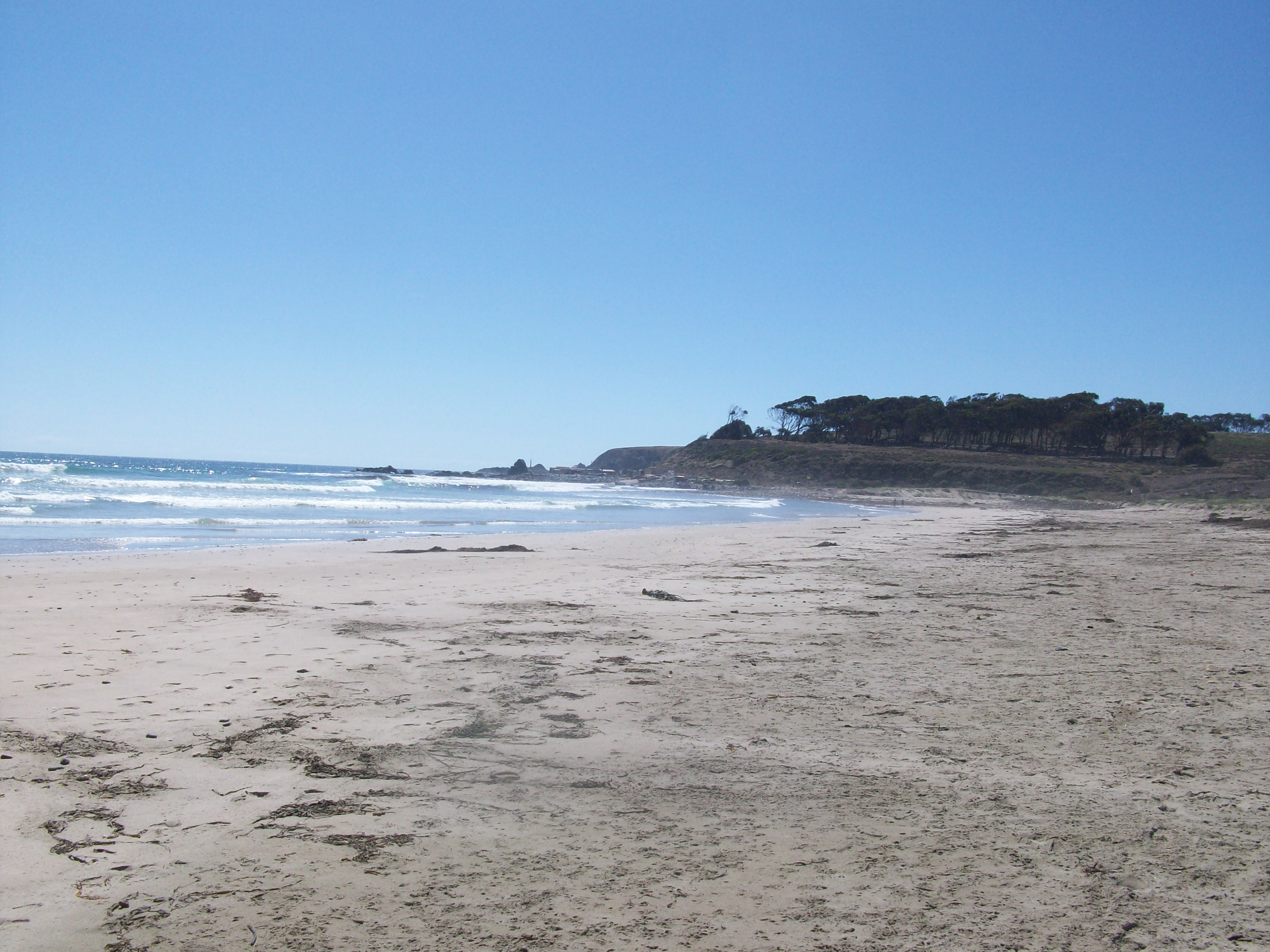 Caleta Chigualoco, Región de Coquimbo, Chile